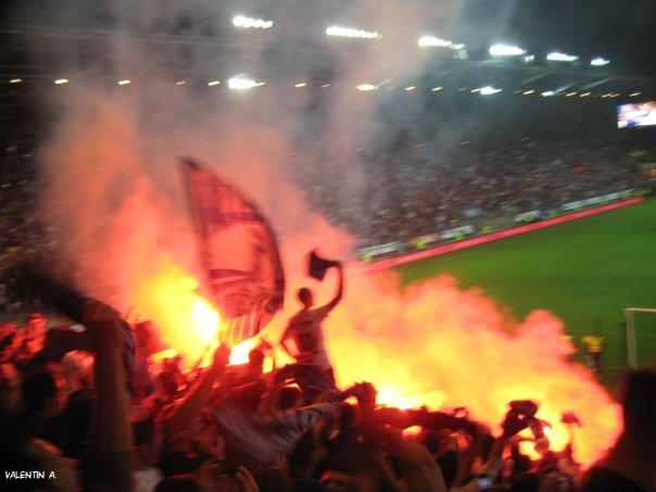 Fin du match du 12 mai contre Chateauroux, montée en ligue 1.